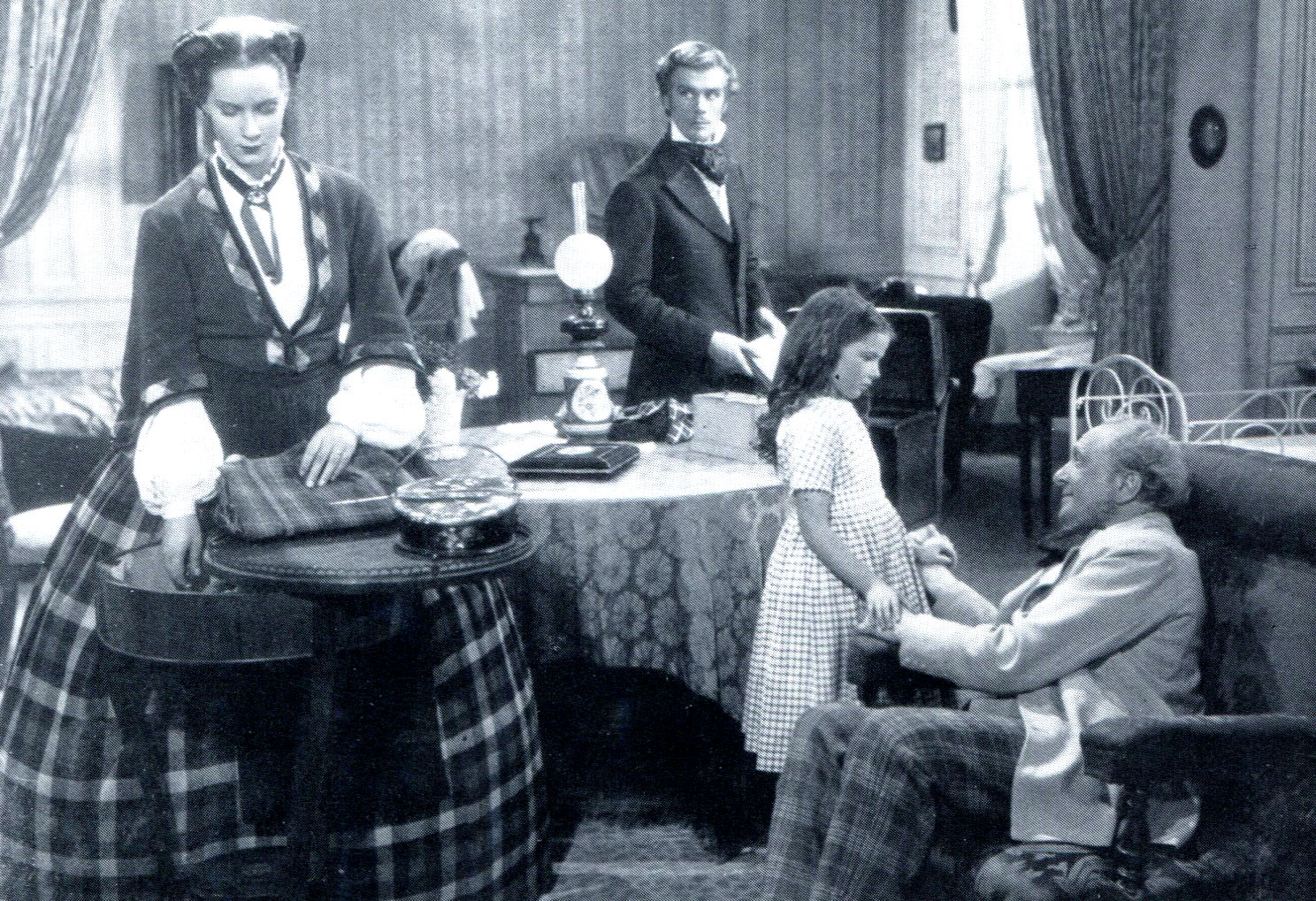 Alida Valli, Massimo Serato, la piccola Mariù Pascoli ed Annibale Betrone in una scena di "Piccolo mondo antico" (Soldati, 1941)